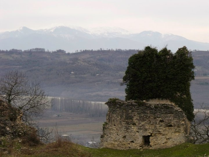 ჭაქვინჯის ციხე